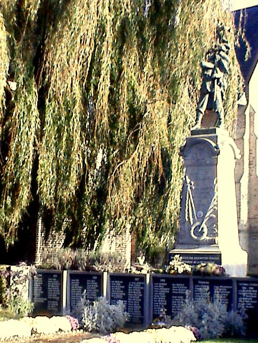 Monument aux morts (Steenvoorde)